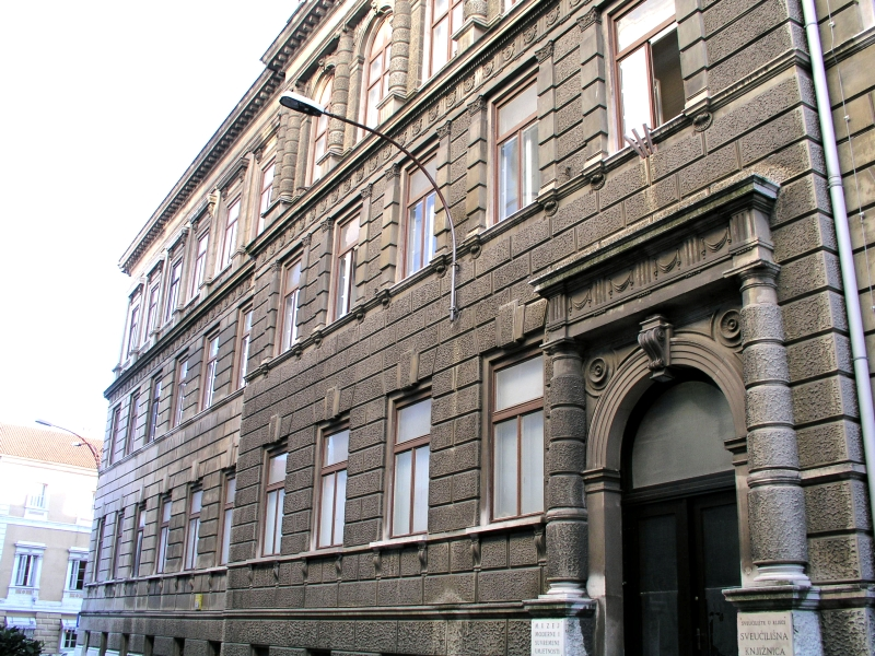 Sveučilišna knjižnica i Muzej suvremene umjetnosti u Rijeci, Hrvatska